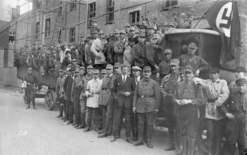 Sturmabteilung aus Essen Josef Terboven (in Zivil) mit Essener SA auf der Fahrt zum Reichsparteitag in Weimar, Juli 1926 Abgebildete Personen: Terboven, Josef: Gauleiter von Essen, Reichskommissar für Norwegen, Deutschland